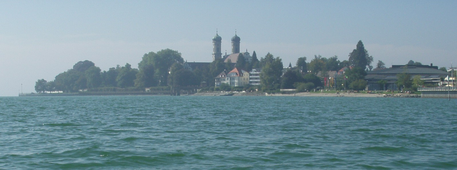 Description = Friedrichshafen, Lake Constance Author = Philipp Hertzog